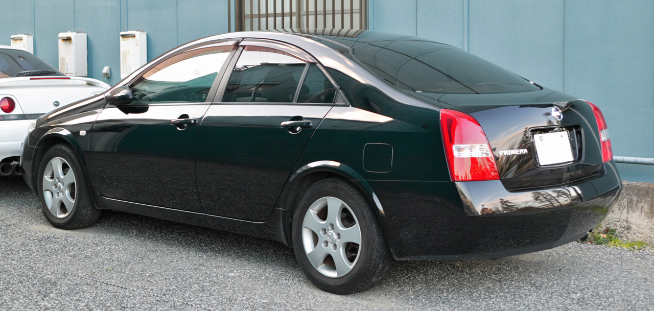 Nissan Primera P12